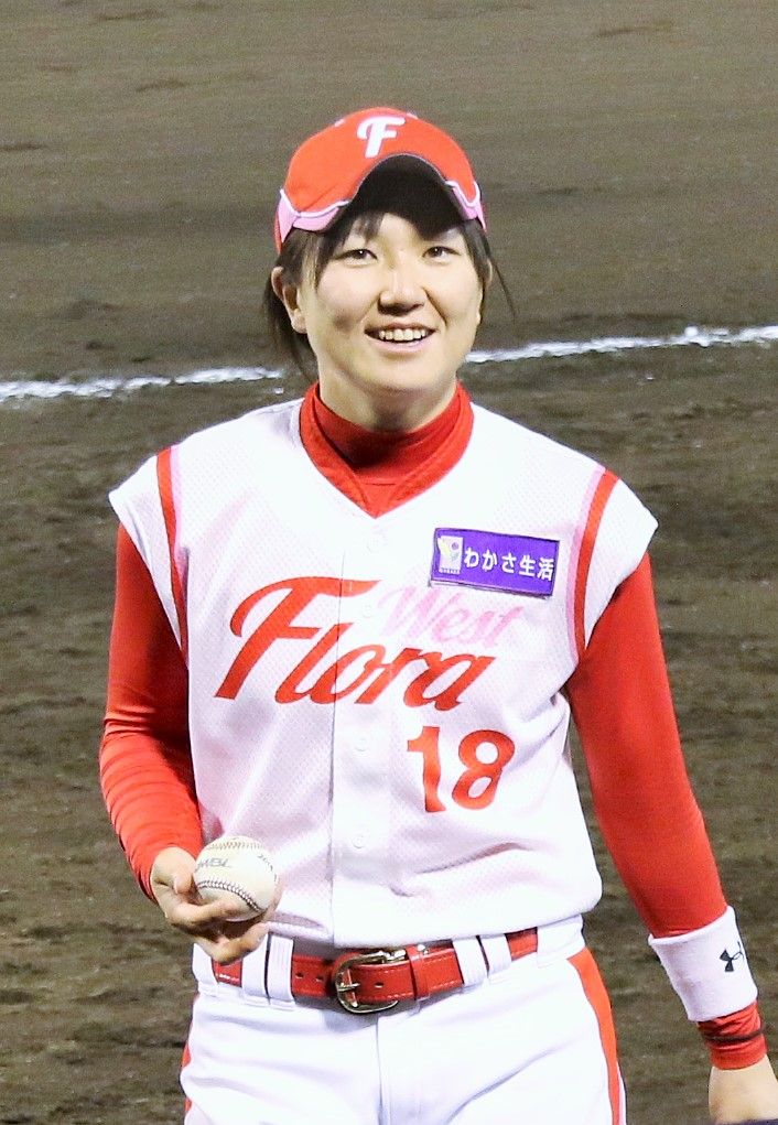 ウエストフローラ小西美加選手兼任コーチ。わかさスタジアム京都にて。